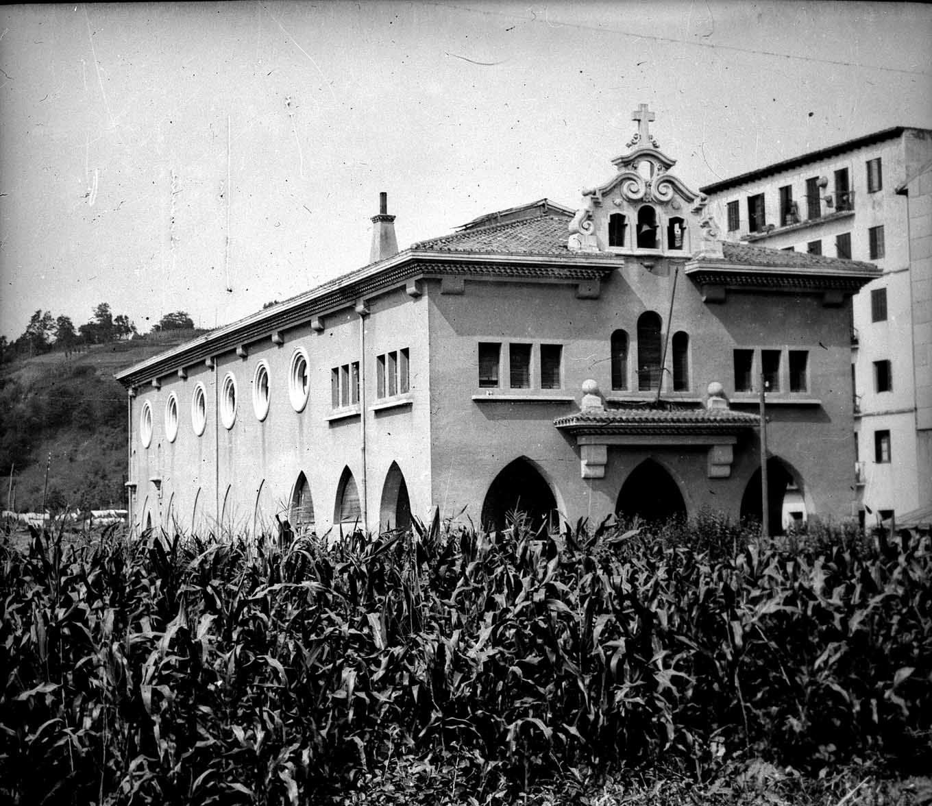 Loiolako Bihotz Sakratuaren eliza 1942an